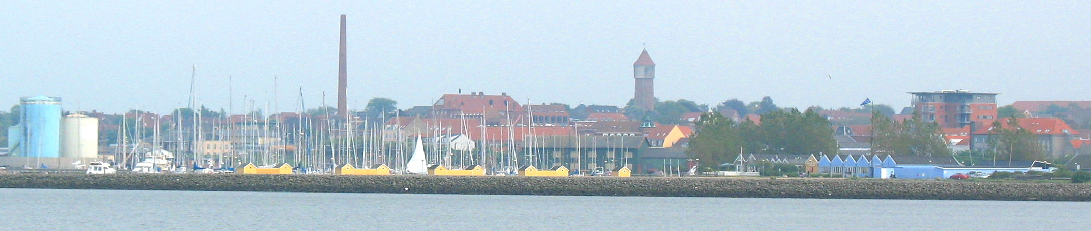 Udsigt mod Struer.